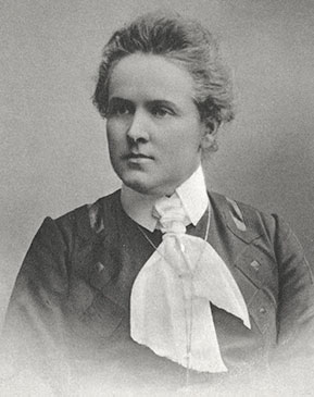 Concordia Selander (1861-1935)